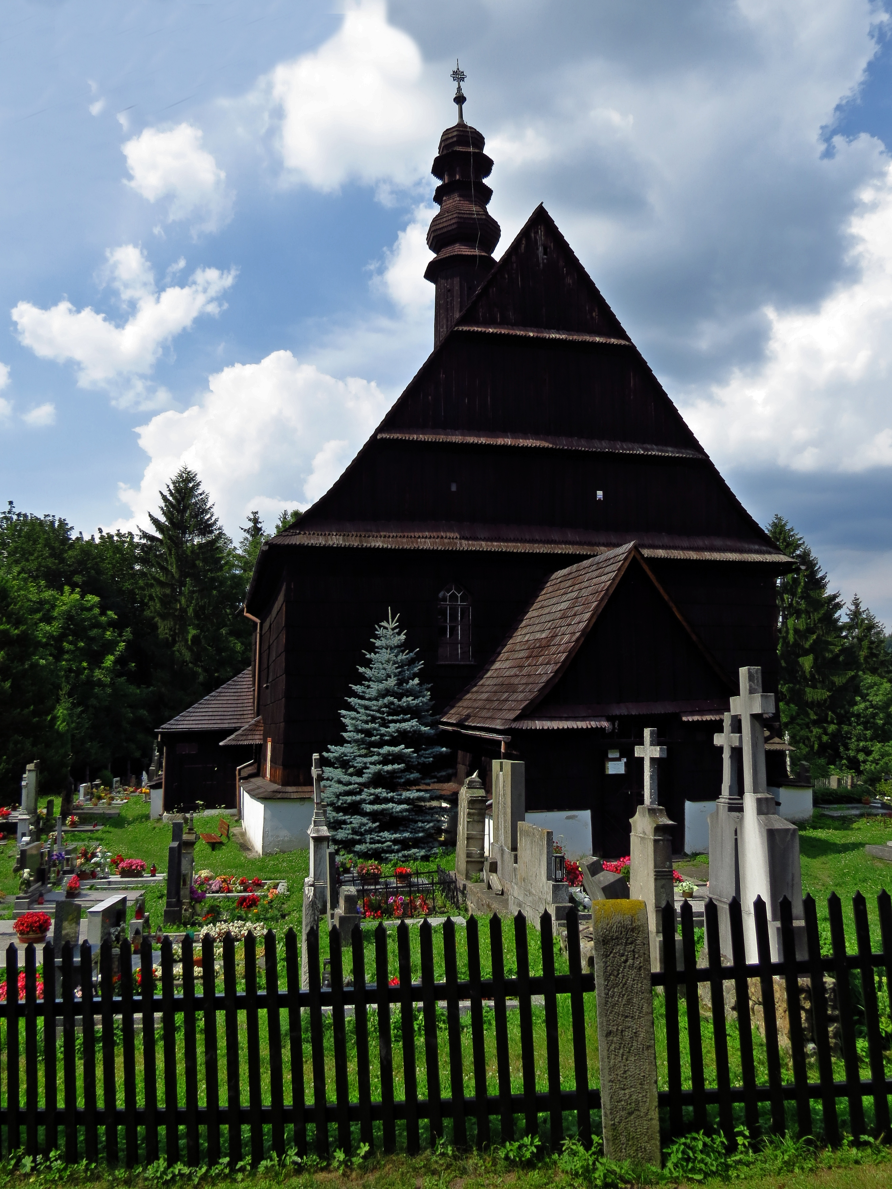 Kostel svatých Petra a Pavla - přední část Project: Chráněná území